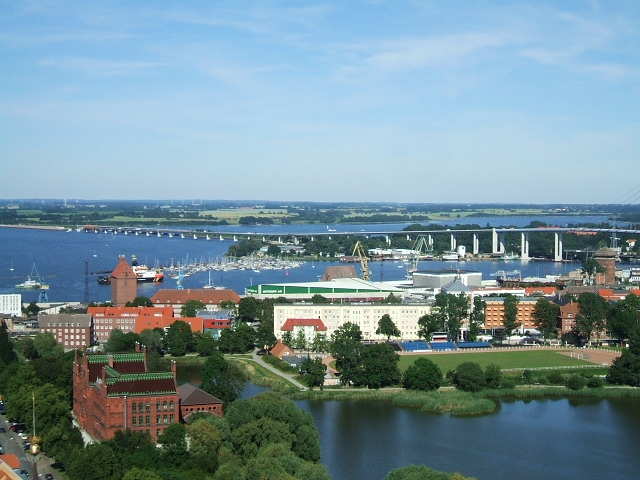 Stralsund, Strelasundquerung, Dänholm und Strelasundbrücke